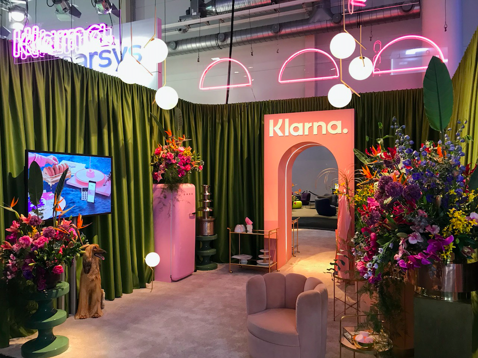 Klarnas "Smooth Lounge" auf dem Online Marketing Rockstars Festival 2019